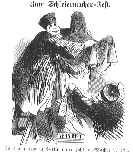 Bildunterschrift „Was man jetzt in Berlin unter Schleier-Macher versteht“